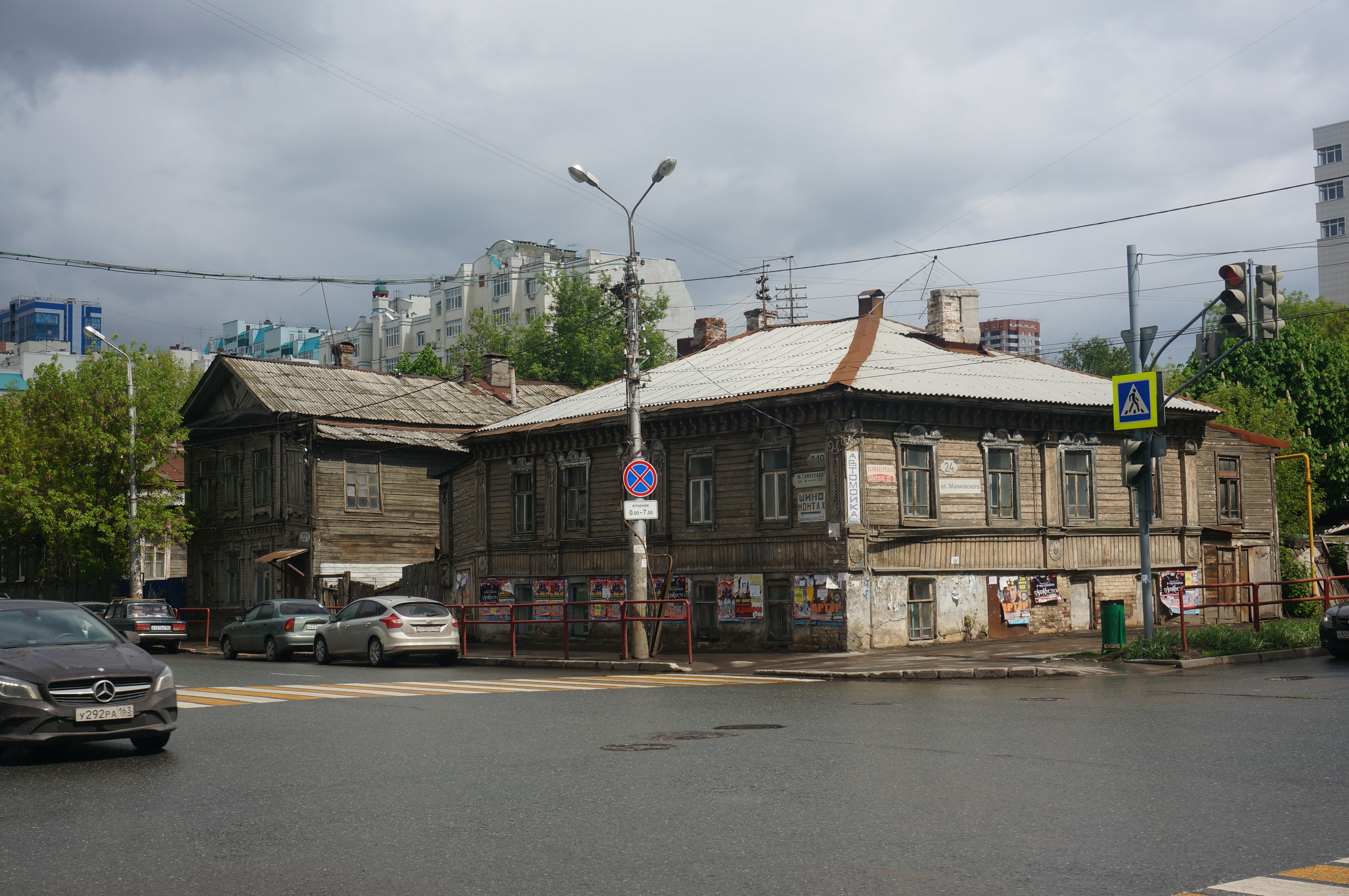 Улица Маяковского, дом 24, Самара